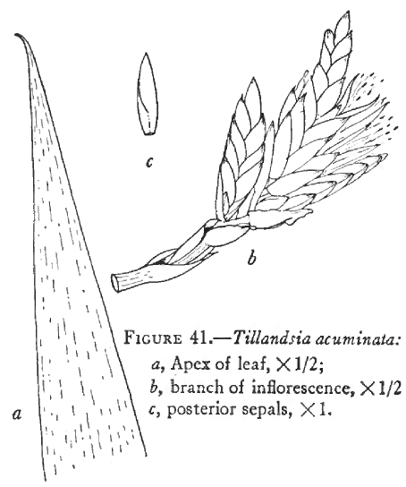 Illustration du protologue de Tillandsia acuminata L.B.Sm. (redisposé)